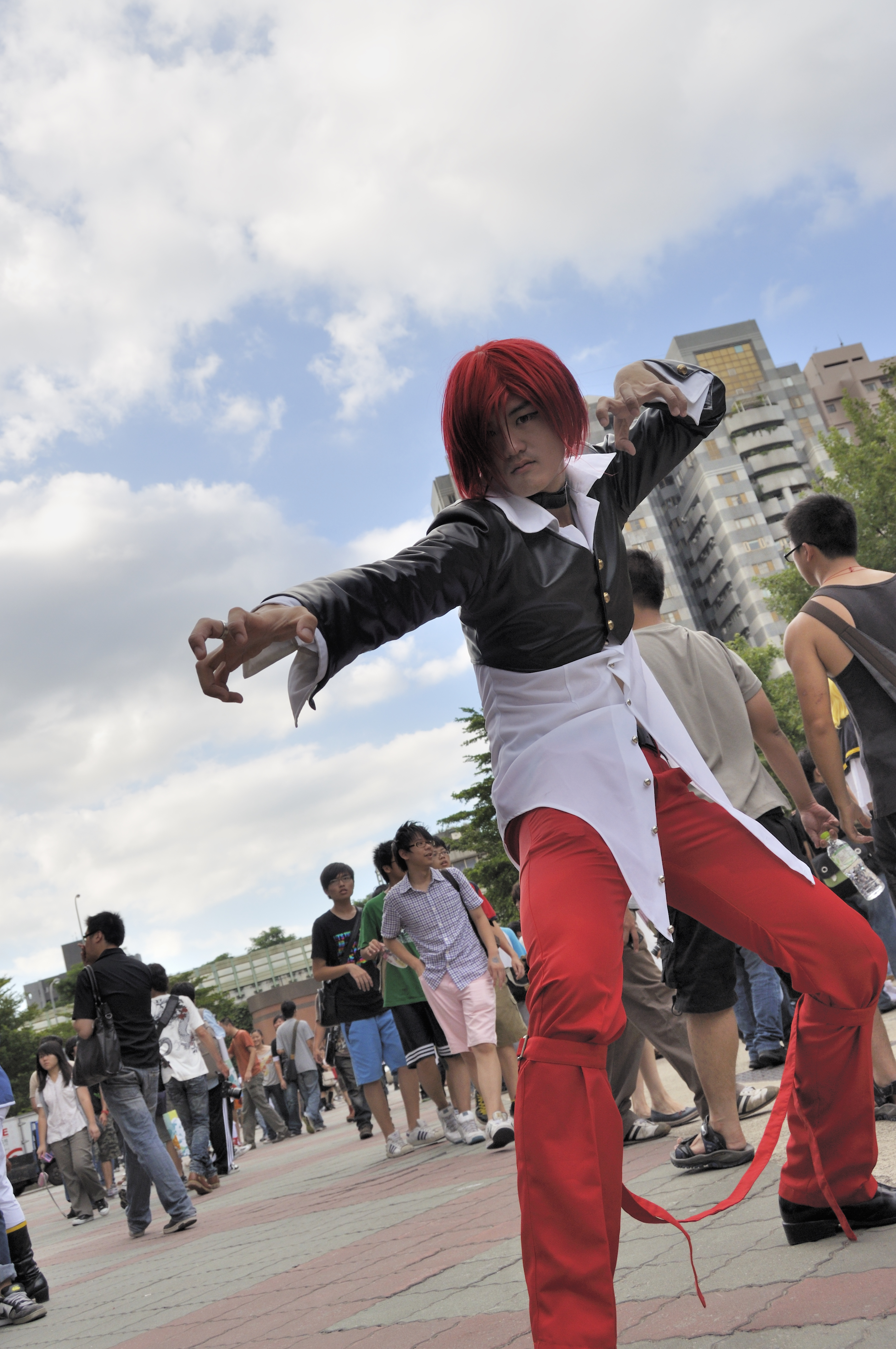 第18屆開拓動漫祭，《拳皇》八神庵cosplayer。